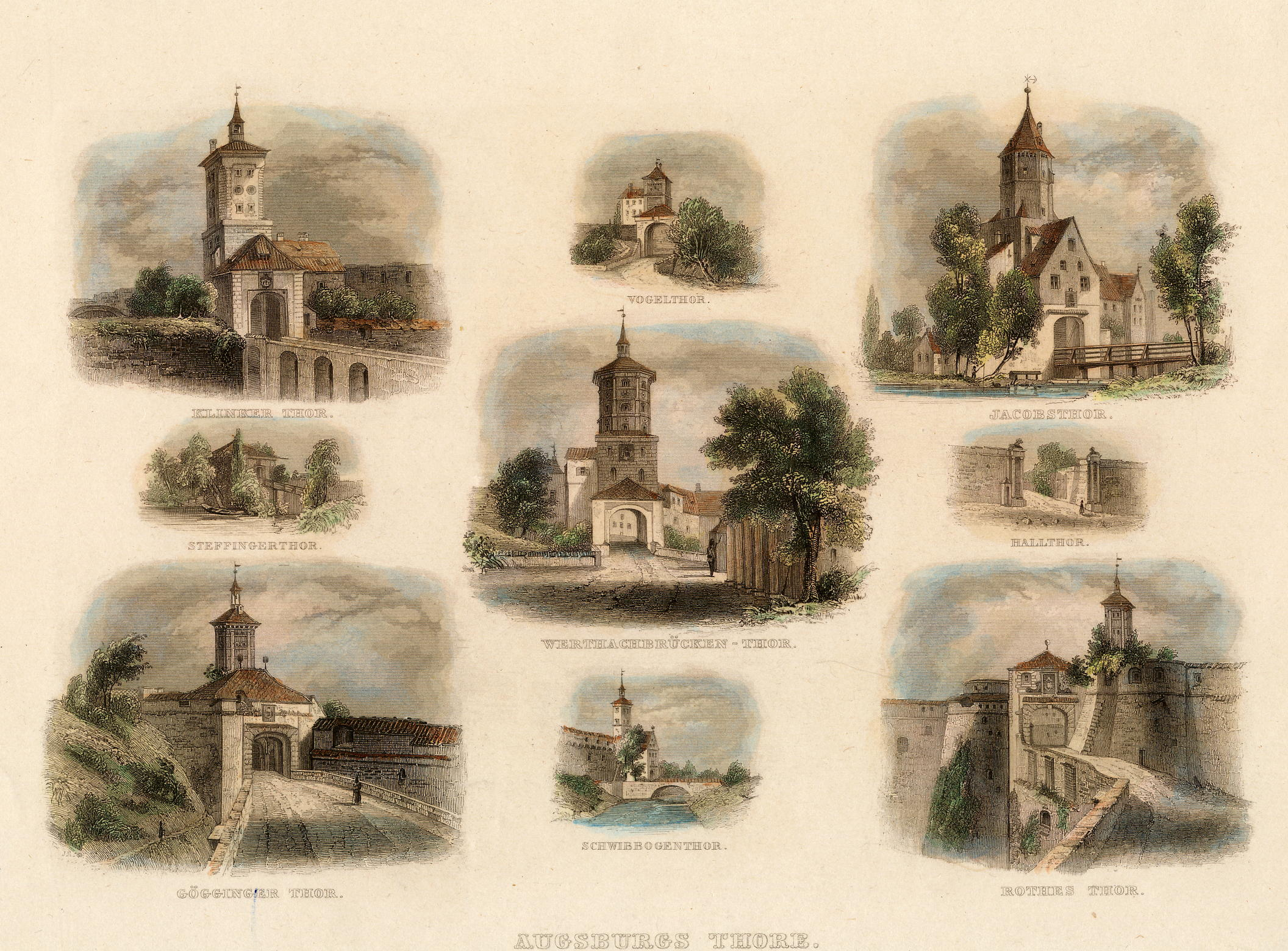 Augsburgs Thore.